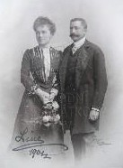 Harrach Otto Johann (1863-1935) s chotí Karolínou Oettingen-Wallerstein